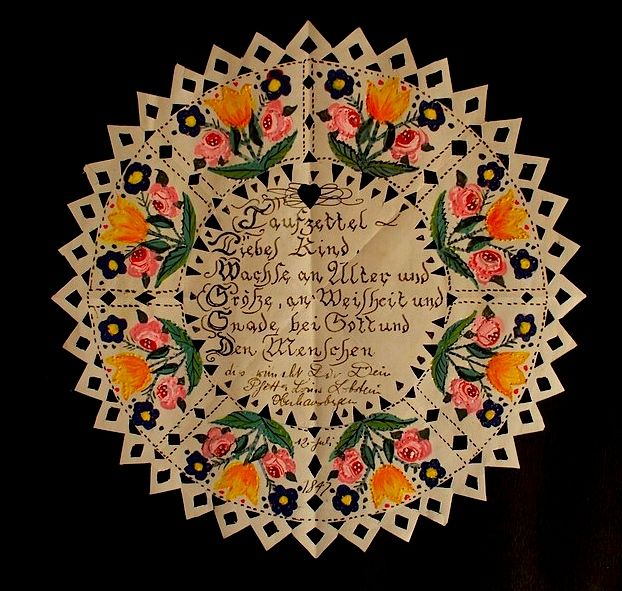 Souhait de baptême Goettelbrief de Oberhausbergen, 1847.